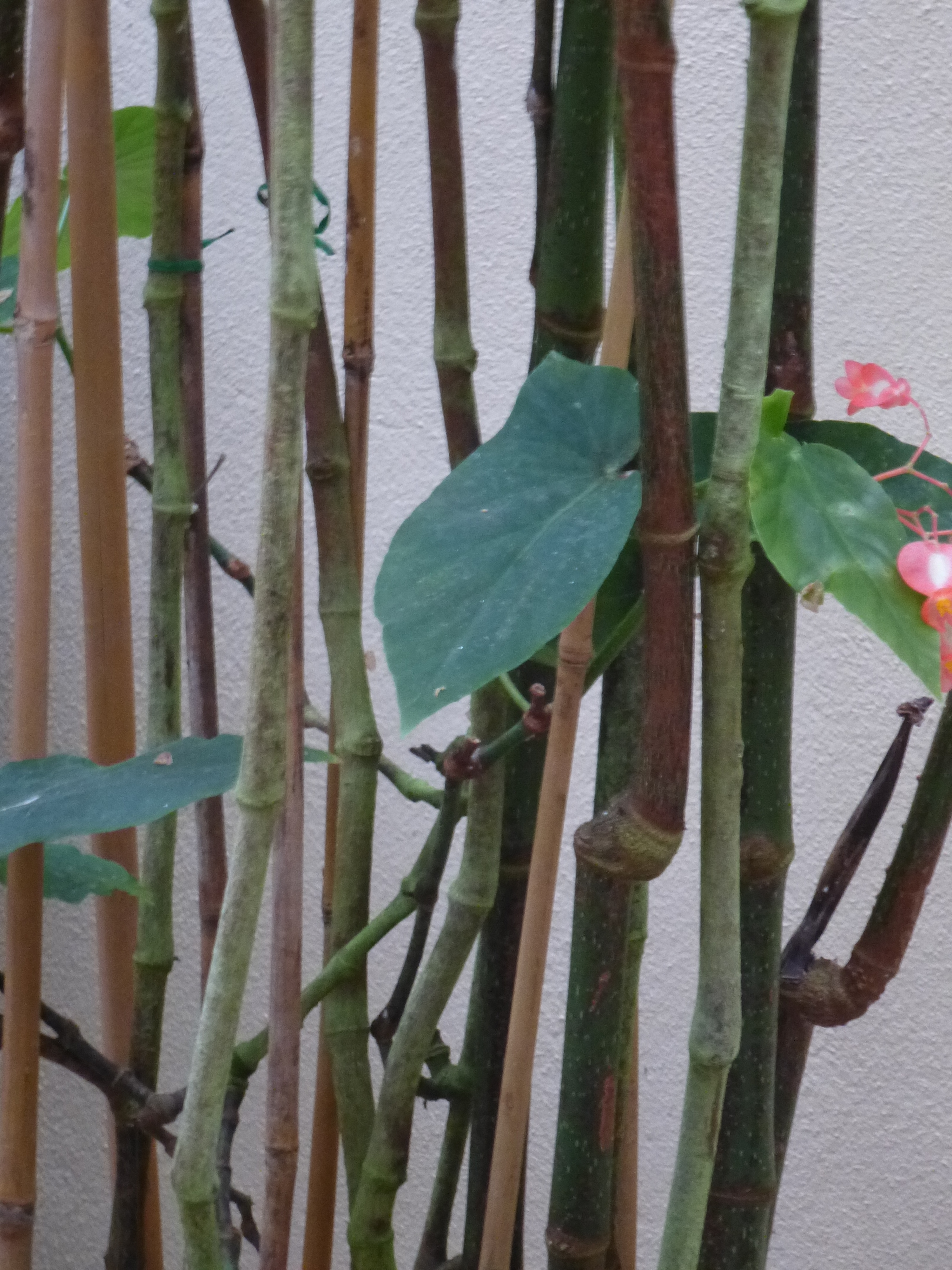 Begonia corallina, (syn. de Begonia maculata). Conservatoire du bégonia, Rochefort-sur-Mer, Charente-Maritime (17), France, Europe.